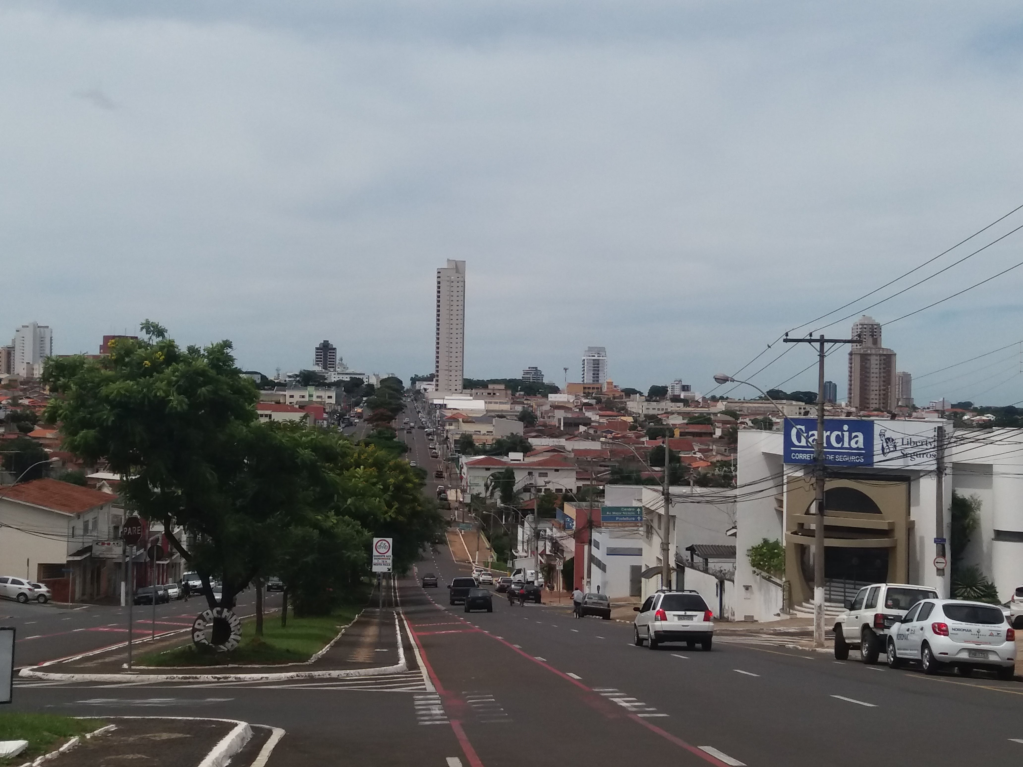 Avenida Presidente Vargas, Franca (SP), Brazil